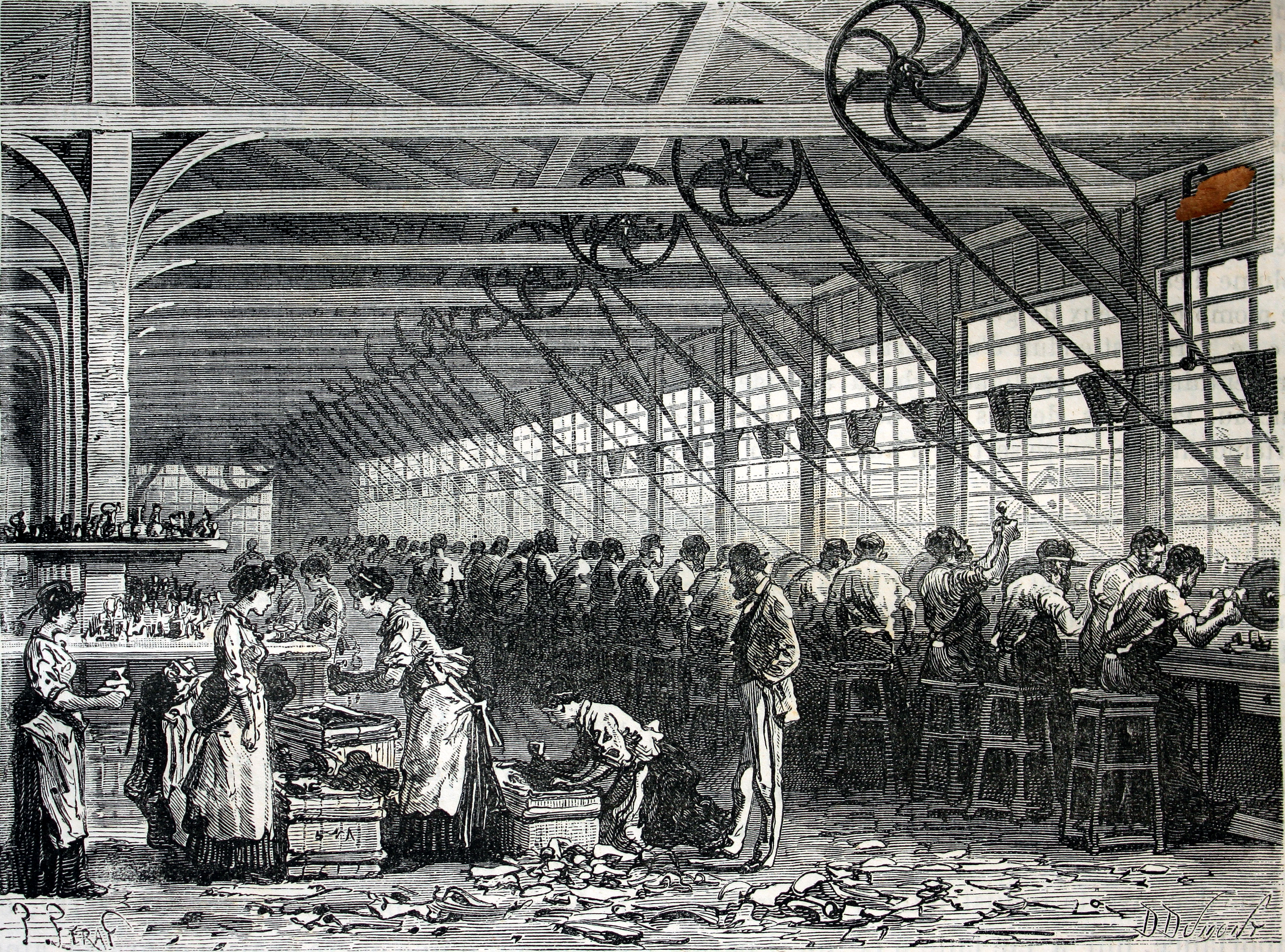 Ilustraciones de la obra : Les merveilles de l'industrie ou, Description des principales industries modernes / par Louis Figuier. - Paris : Furne, Jouvet, [1873-1877]. - Tome I